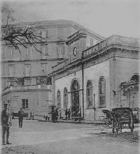 La Stazione superiore della Funicolare di Chiaia, in Via Cimarosa al Vomero, all'inizio del XX secolo.